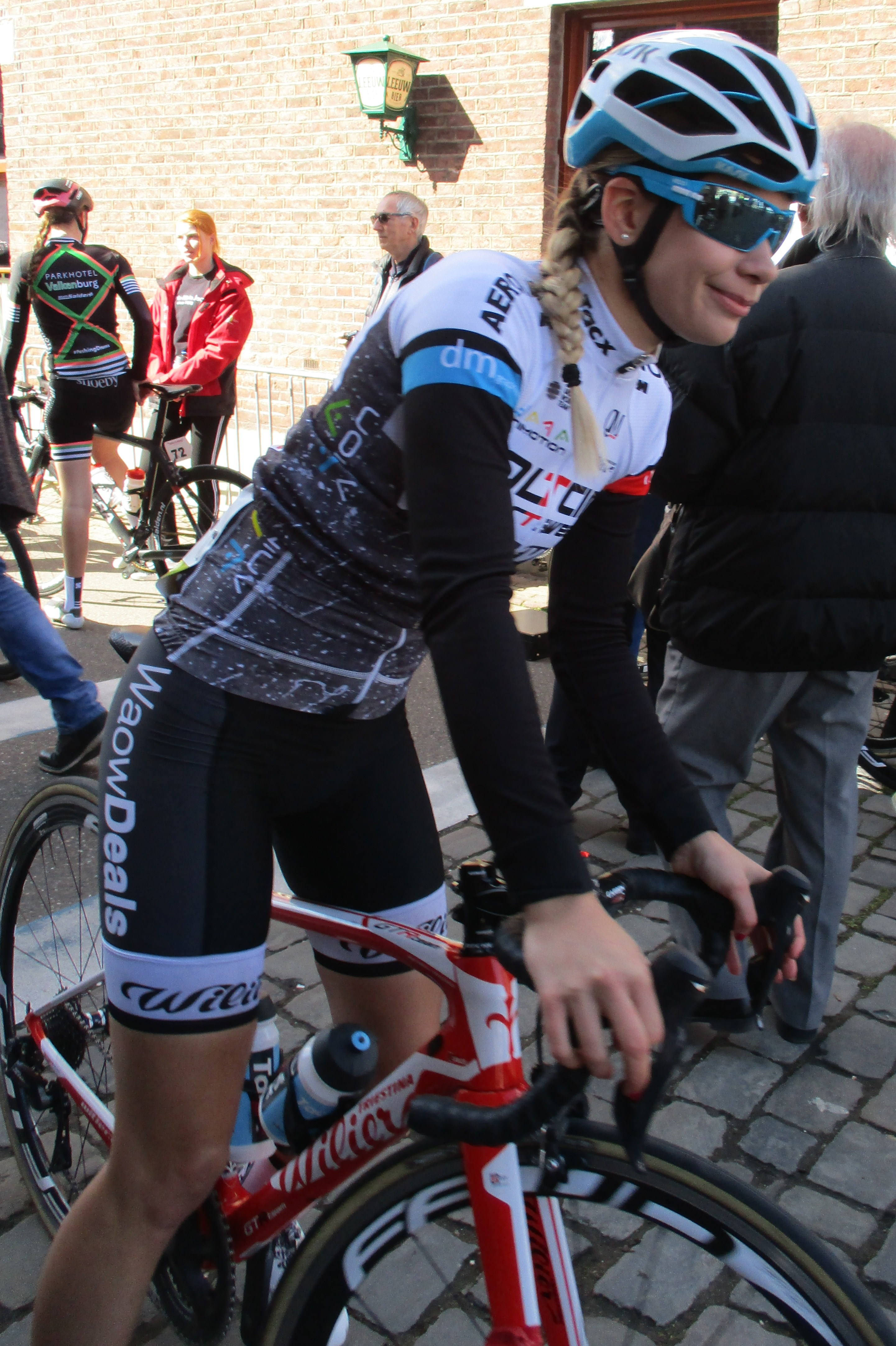 Start van de Volta Limburg Classic voor vrouwen 2018 in de Diepstraat in Eijsden